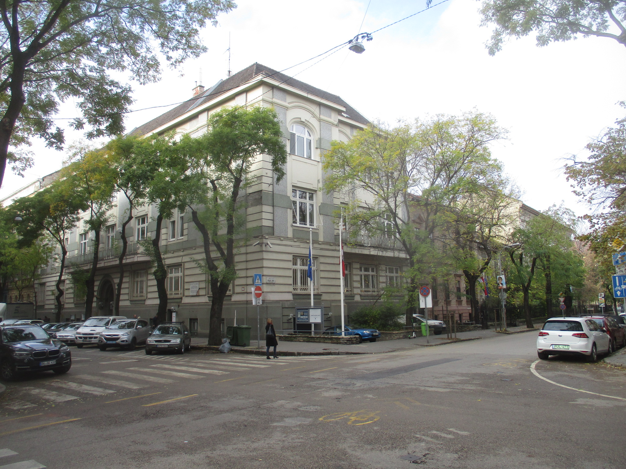 Ausztria budapesti nagykövetsége (Budapest VI. Bajza utca- Benczúr utca sarok)